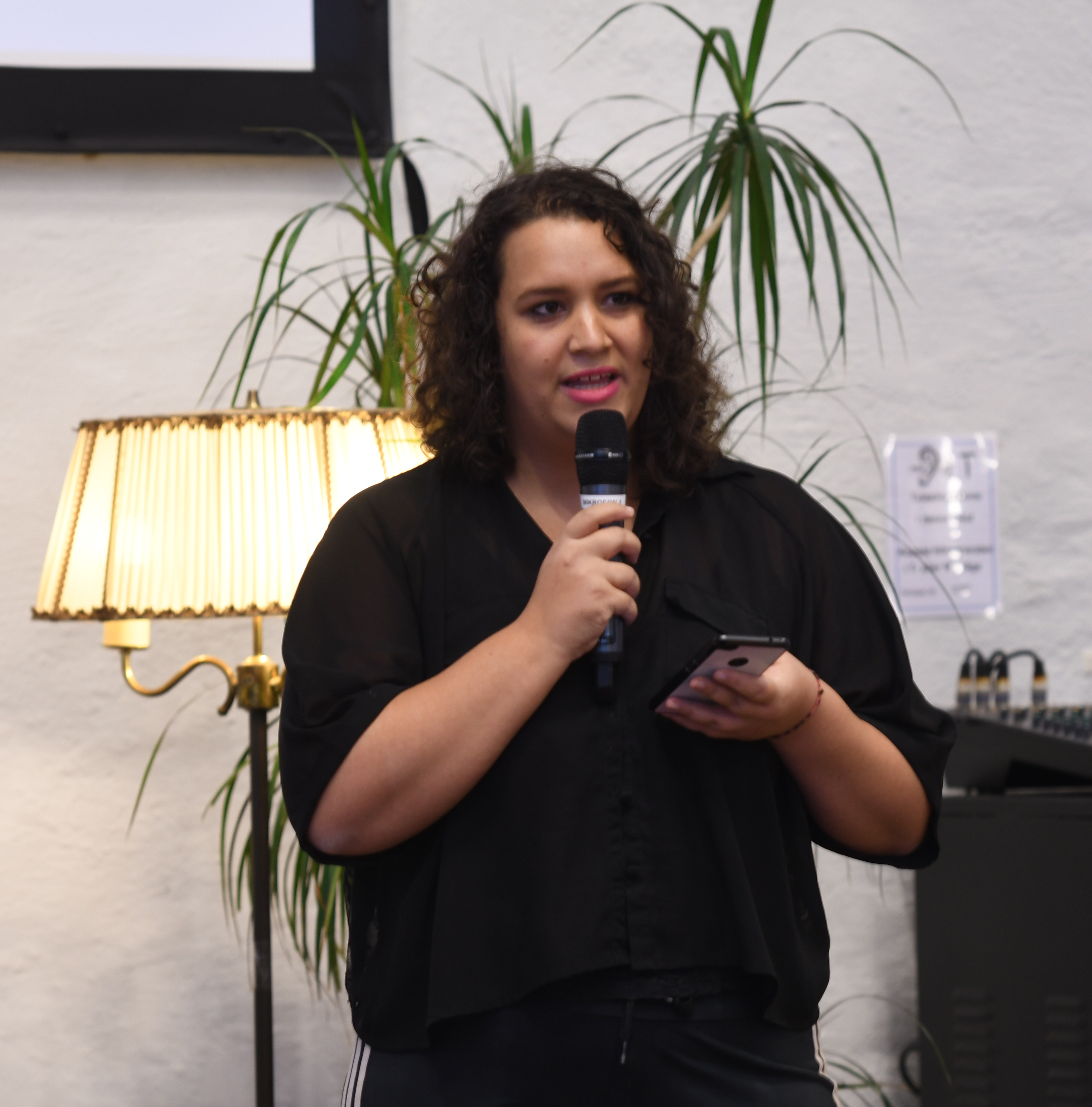 Garagets bokmässa 2018, Malmö. Felicia Mulinari.